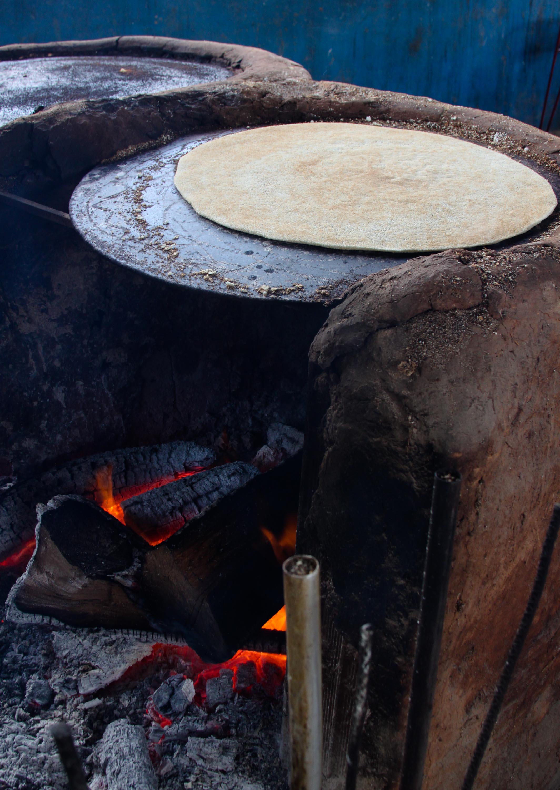 Producción de Casabe, poblado La Negra, Estado Apure, Venezuela